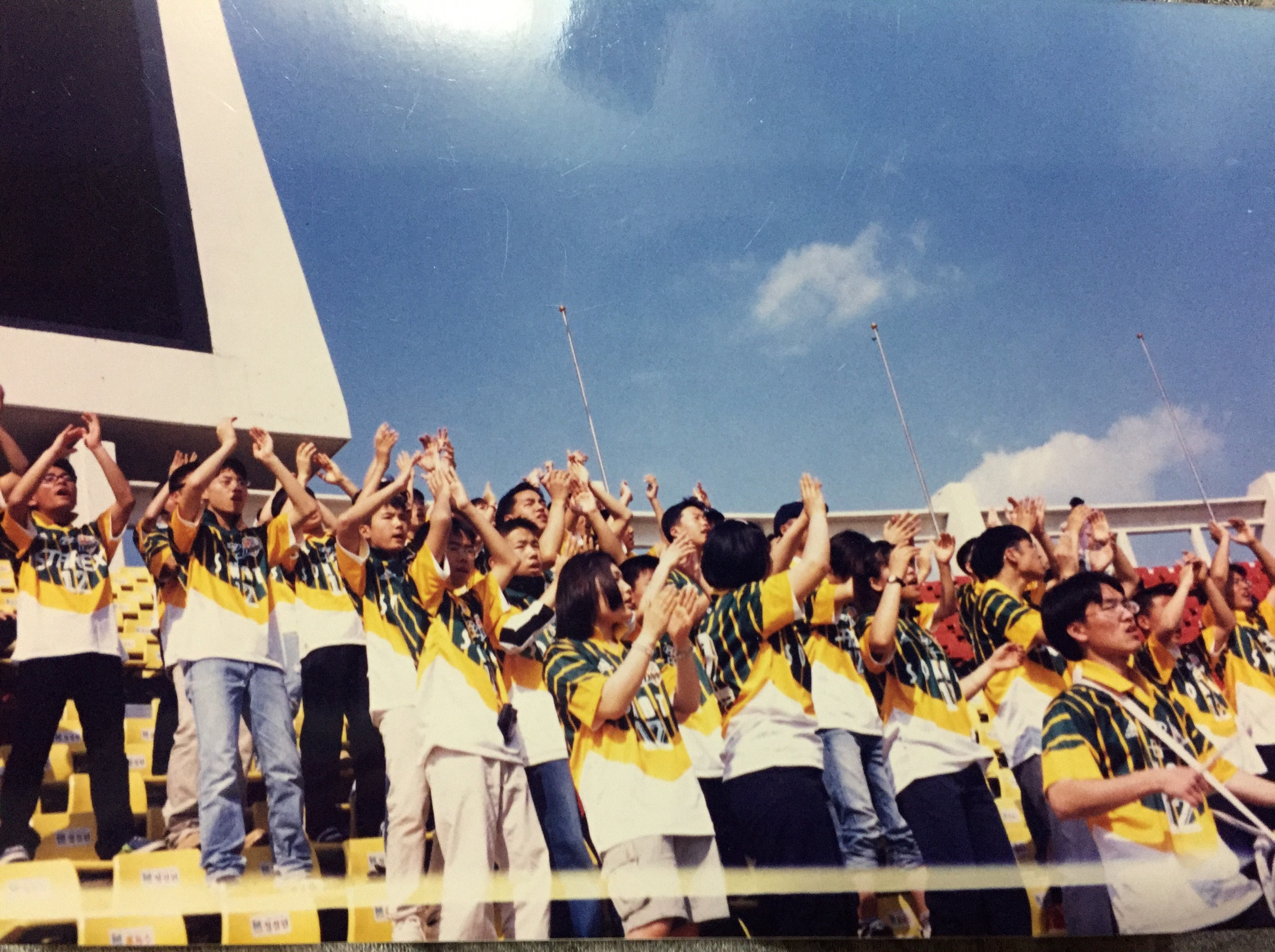 1999년 전주종합경기장 엠지비